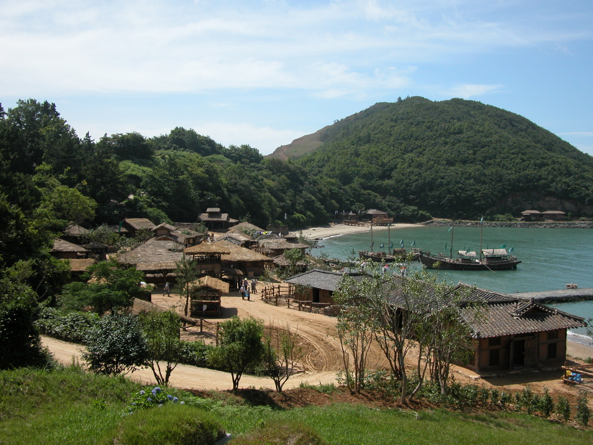 청해포구 촬영장. 드라마 해신을 촬영하기 위하여 KBS와 완도군이 합작하여 지은 드라마 세트장이다. 현재 각종 역사드라마 및 영화가 활발히 촬영되고 있는 곳이다.